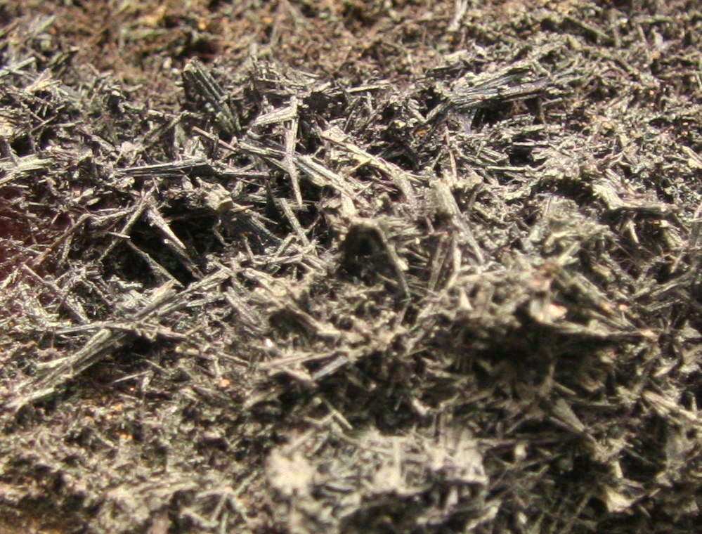 Stromeyerit aus Kasachstan, Exponat in der Terra Mineralia Freiberg